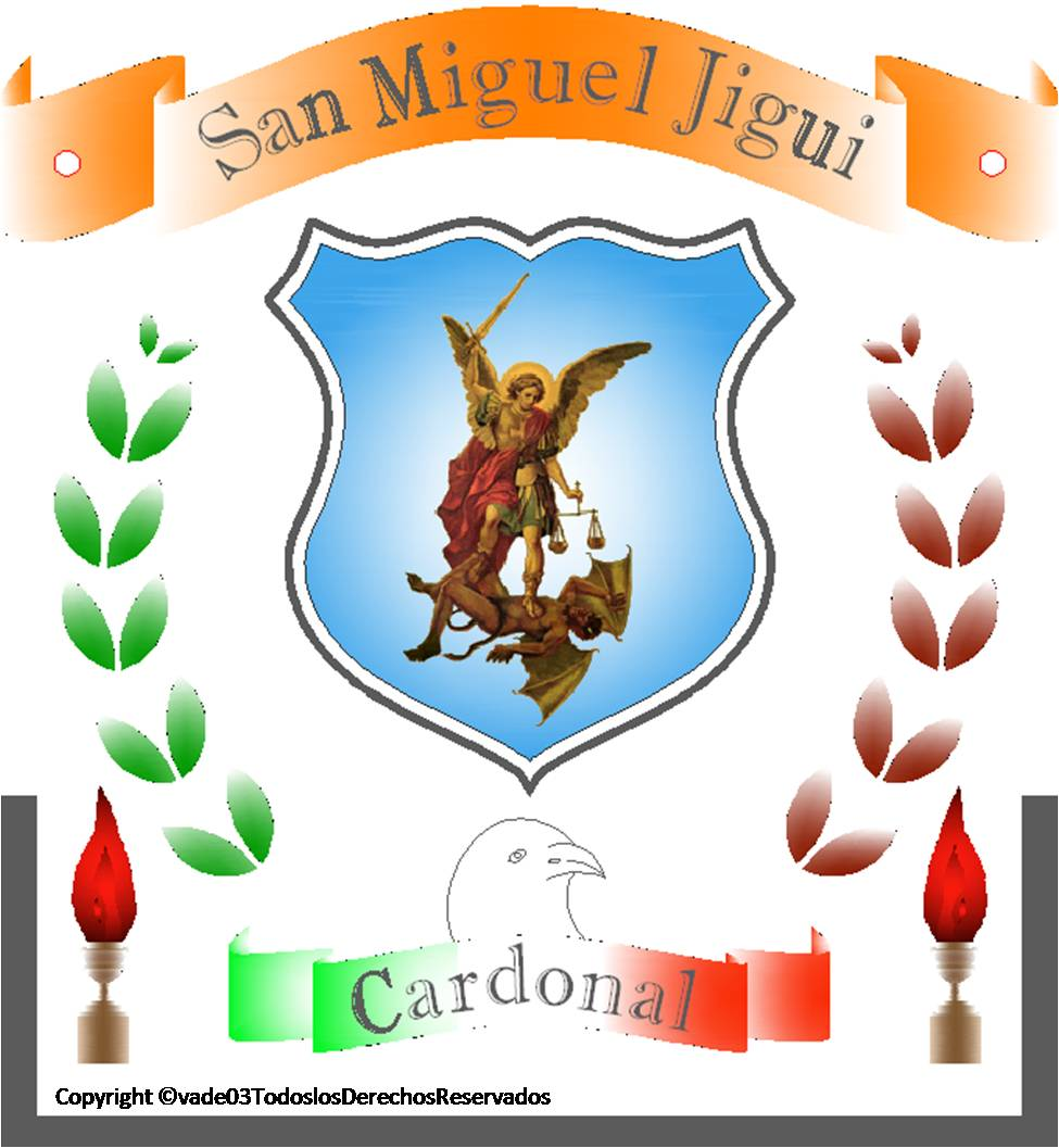 Logo de la Com. de San Miguel Jigui